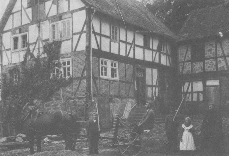 Hof Reimold am Ortsausgang Richtung Braunhausen